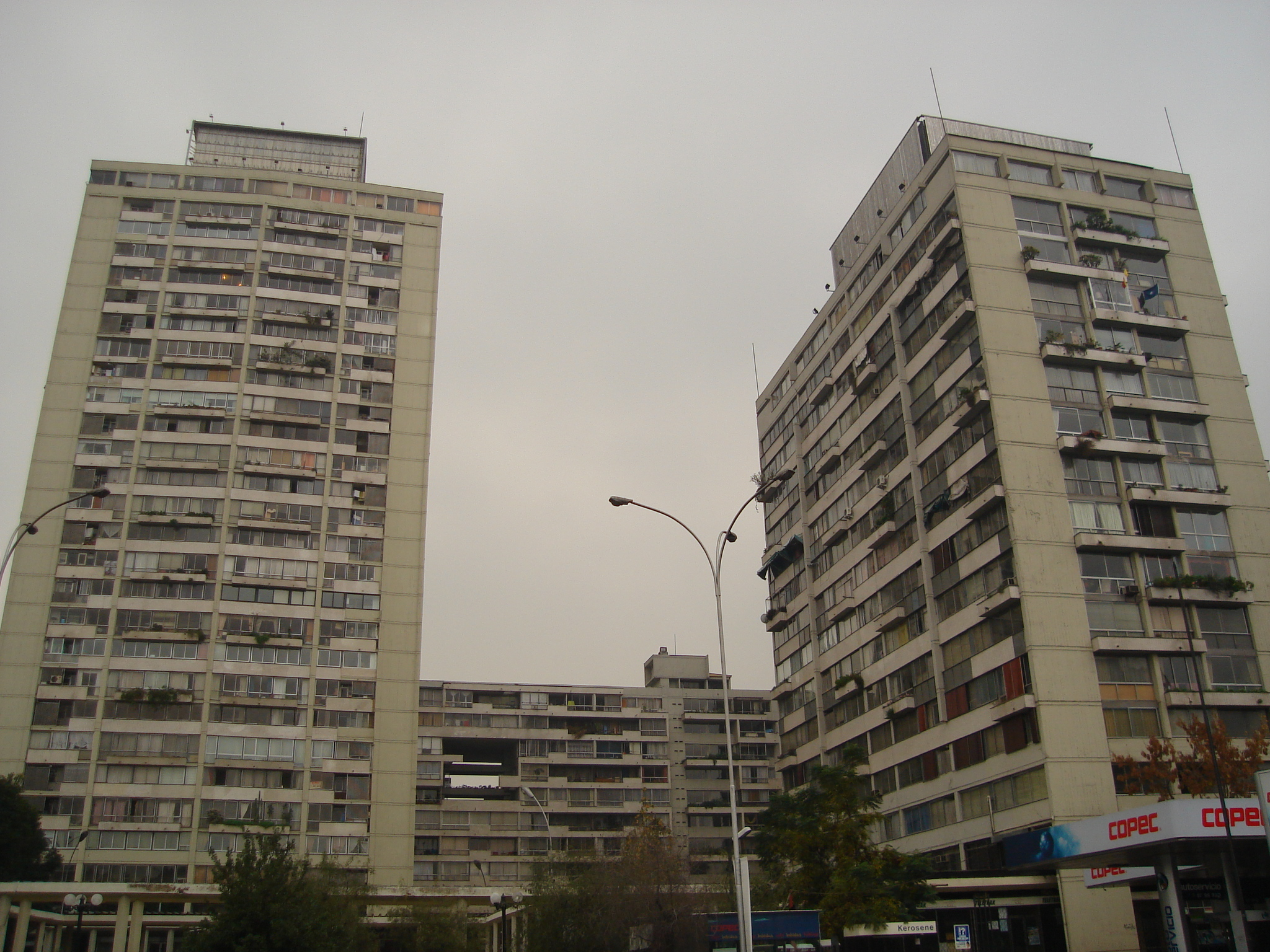 Torres de Tajamar